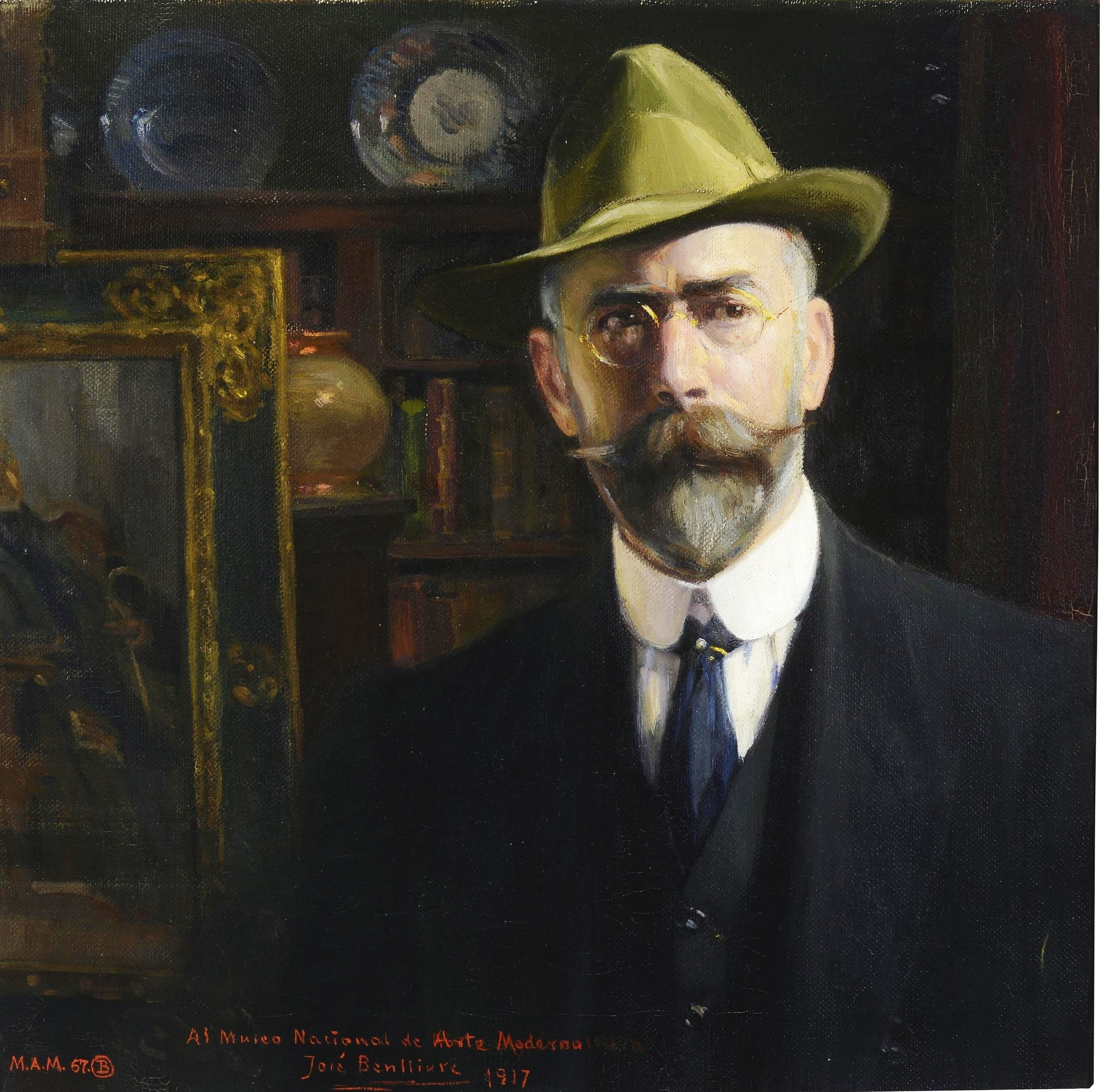 Autorretrato del pintor español José Benlliure Gil (1855-1937).